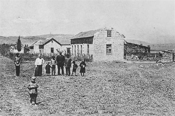 יסוד המעלה - בניינים ראשונים - משפחה